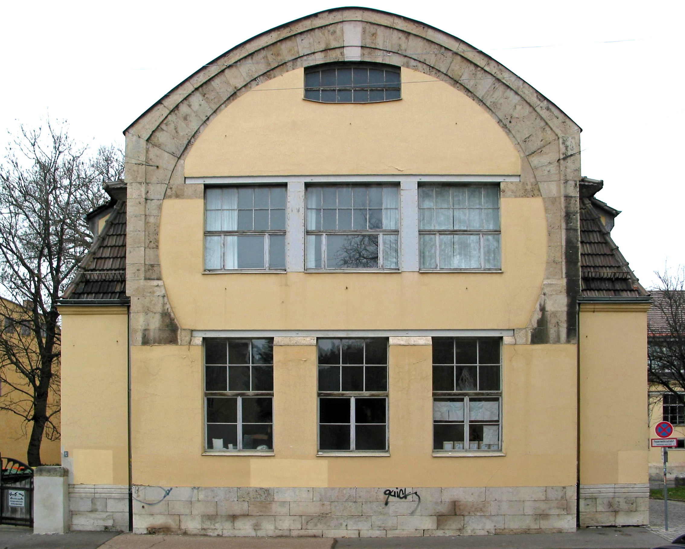 Der hufeisenförmige Südgiebel des ehem. Kunstgewerbeschulbaus (heute "Van-de-Velde-Bau" genannt), hinter den Fenstern im 1.OG lag das Büro des belgischen Architekten Henry van de Velde, nach dessen Entwurf das Gebäude 1905-1906 für die "Großherzoglich-Sächsische Kunstgewerbeschule Weimar" errichtet und zwischen 1919 und 1925 vom "Staatlichen Bauhaus zu Weimar" genutzt wurde. Heute ist das Gebäude Sitz der Fakultät Gestaltung der "Bauhaus-Universität Weimar" und gehört seit 1996 zum Weltkulturerbe der UNESCO. Geschwister-Scholl-Straße 7, Weimar/Thüringen.